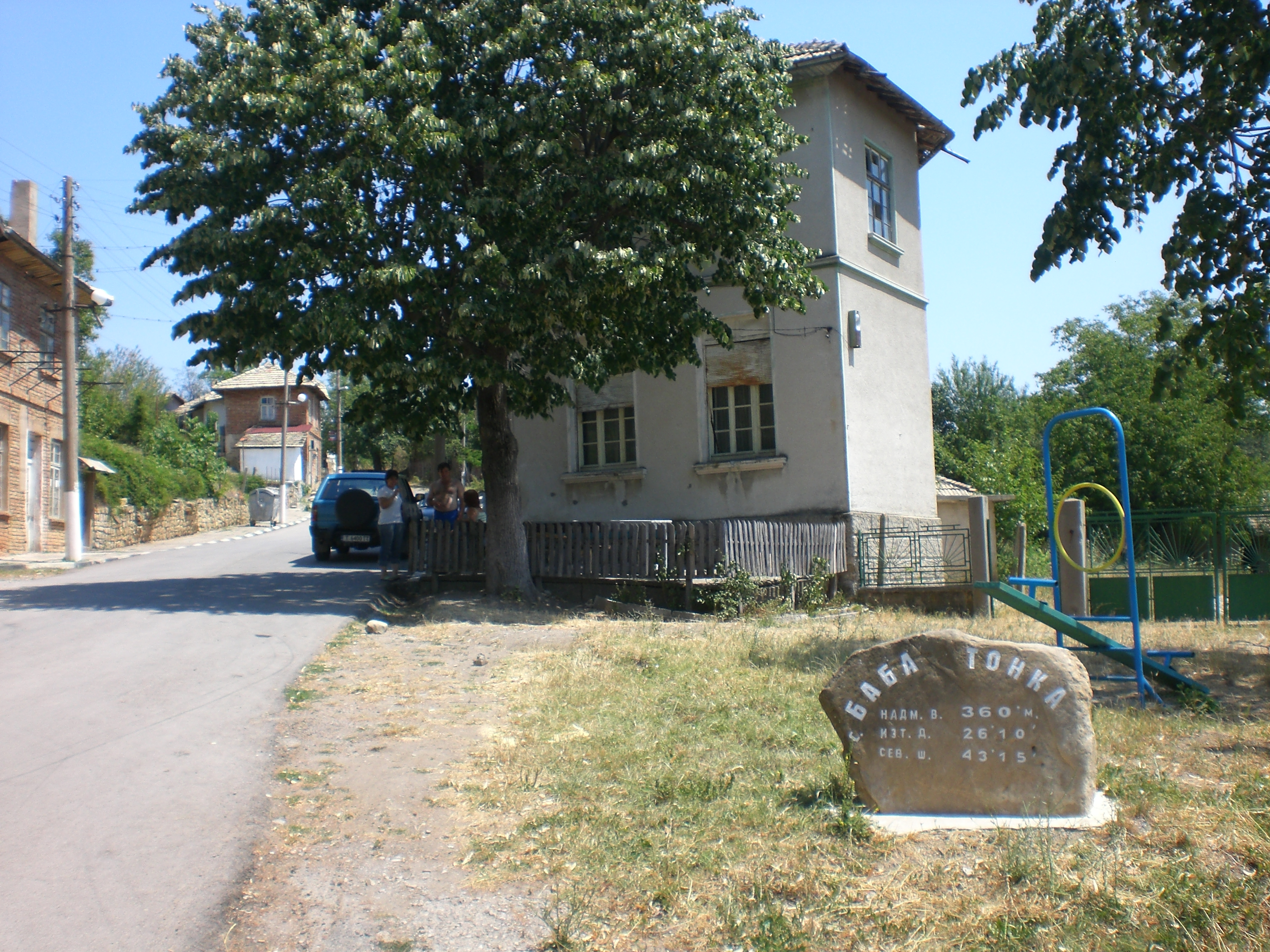 Поглед към началото на селото Баба Тонка, идвайки от град Попово.